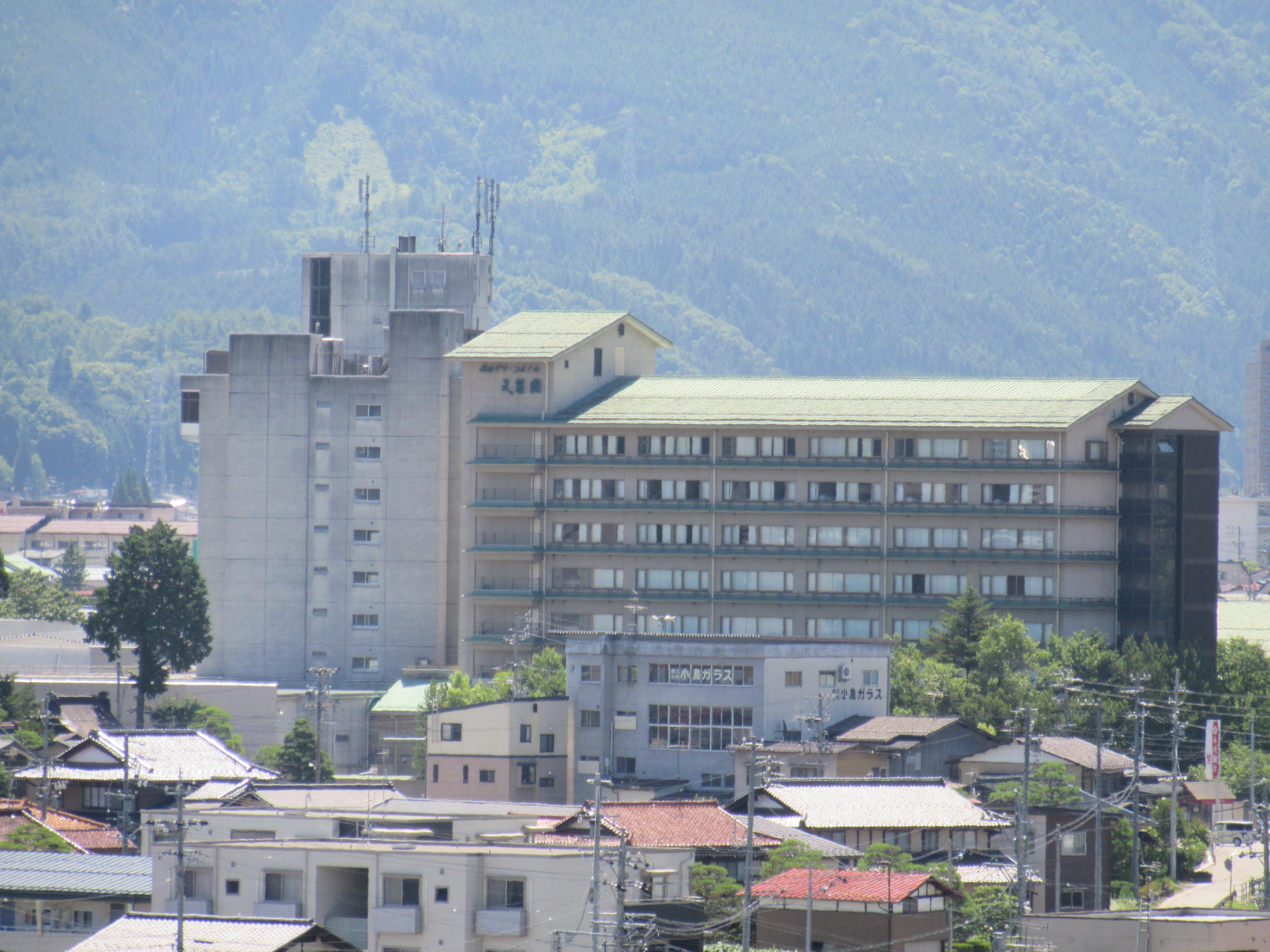 高山グリーンホテル